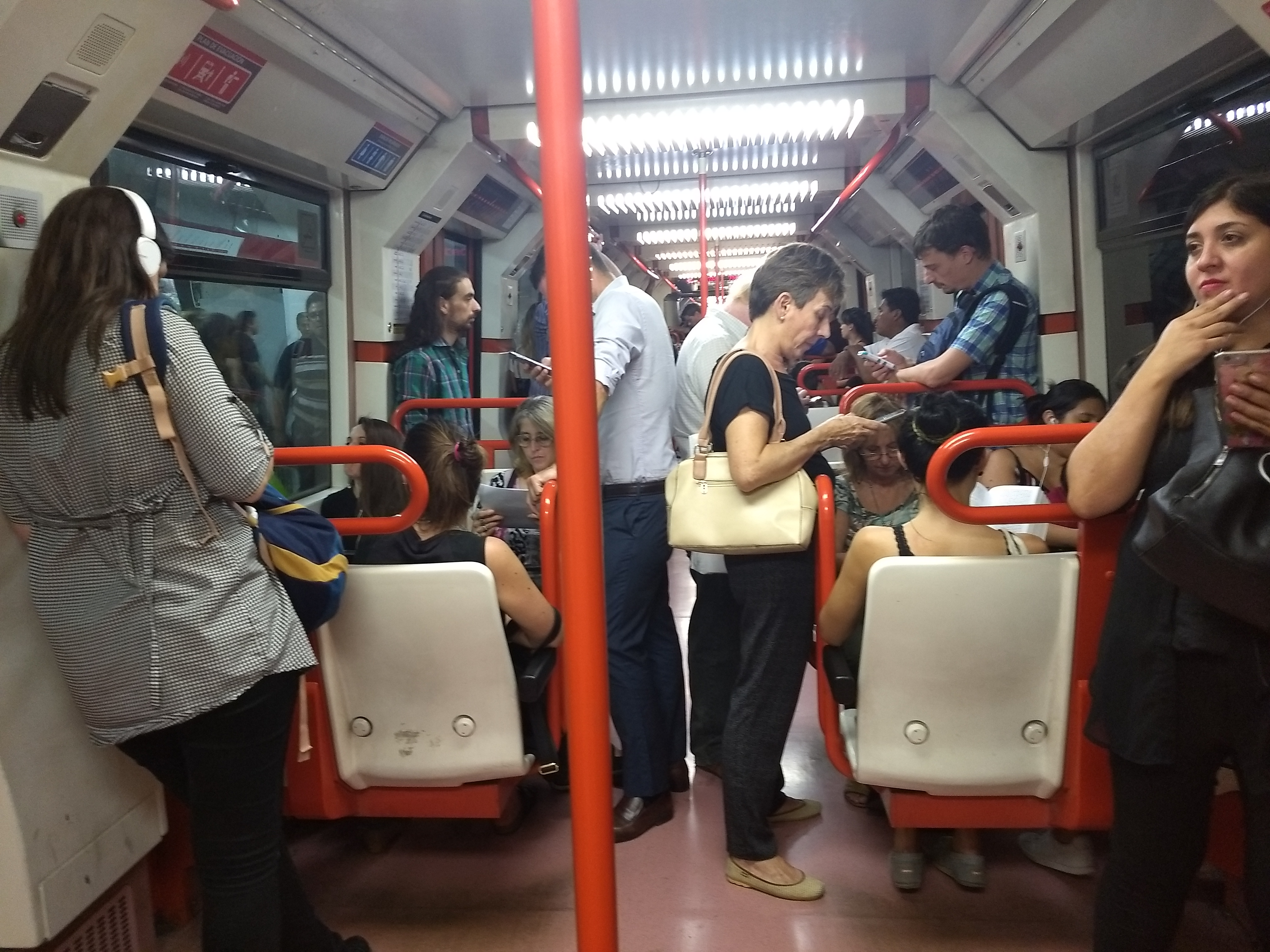 Interior de un subte de la línea B llegando a la estación Florida desde la cabecera Leandro N. Alem.